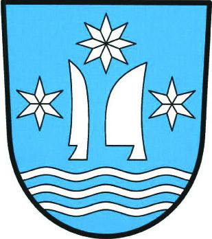 Charváty znak